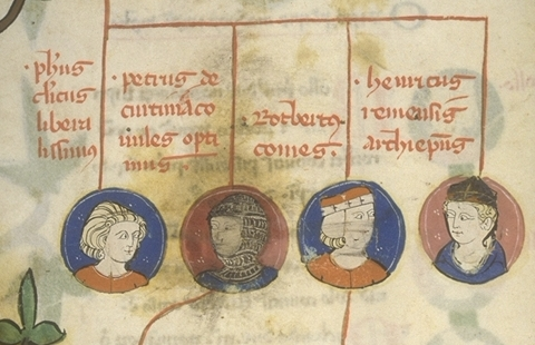 Toulouse, Bibliothèque municipale MS 450: Bernard Gui, De origine prima Francorum f 190v